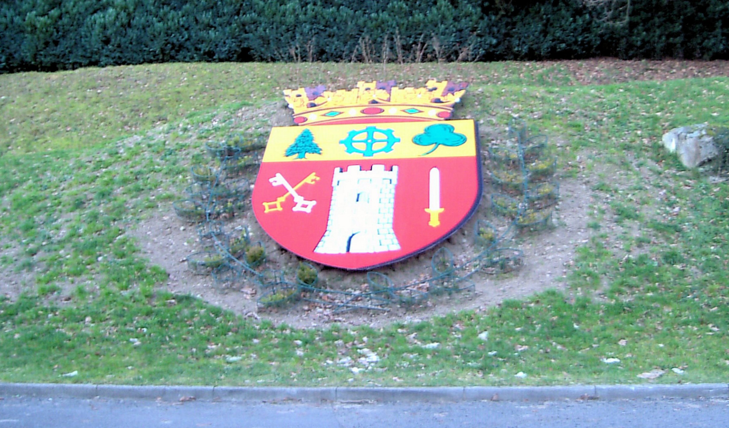 Blason de Saint-Nabord, Rue d'Église, derrière la mairie